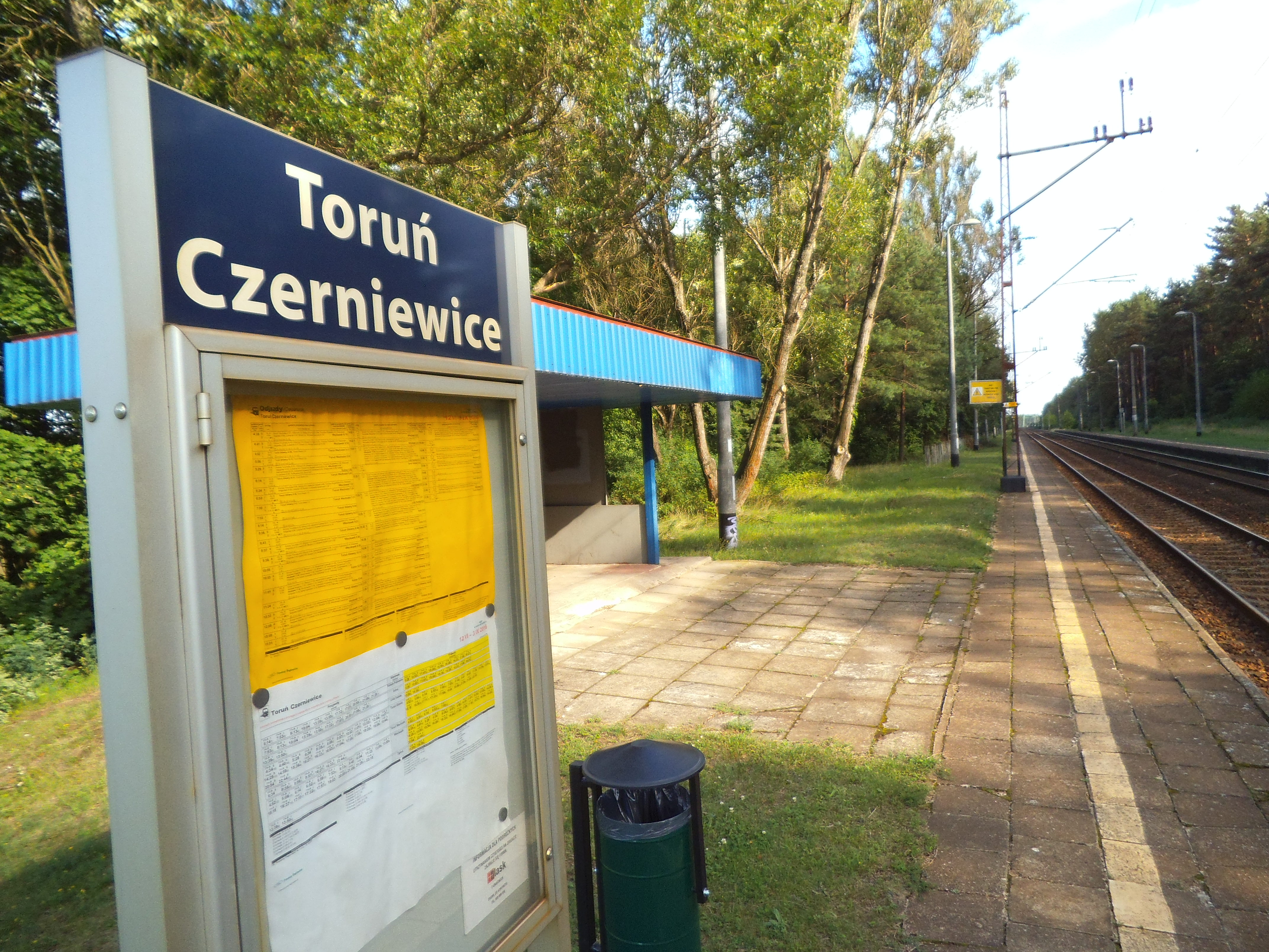 Toruń Czerniewice2